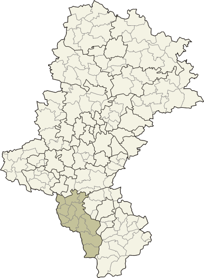 Powiat cieszyński w województwie śląskim